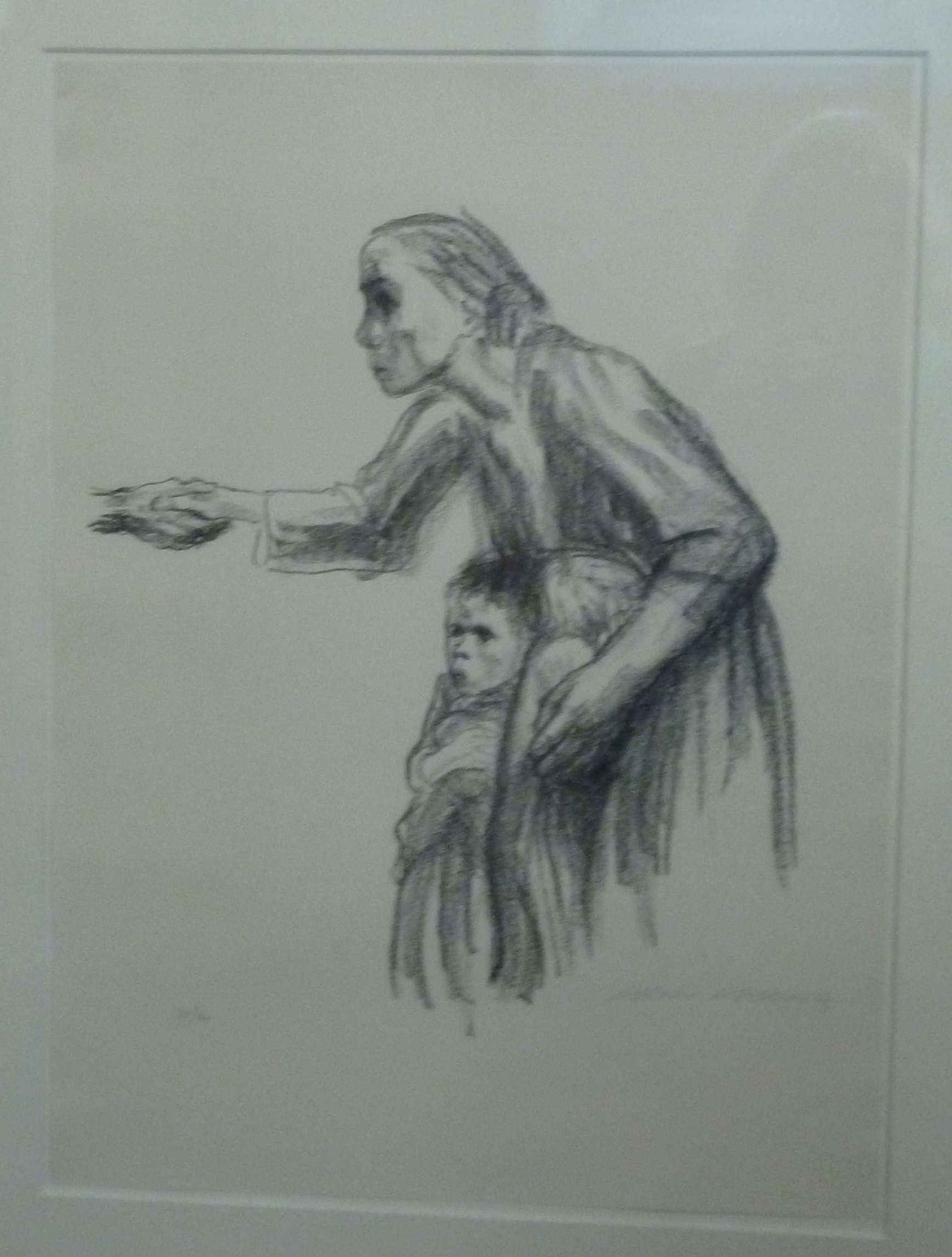 Grafik von Käthe Kollwitz „Die Begegnung mit dem Tod“ in der Kirche St. Laurentius in Wanne Nord, Herne